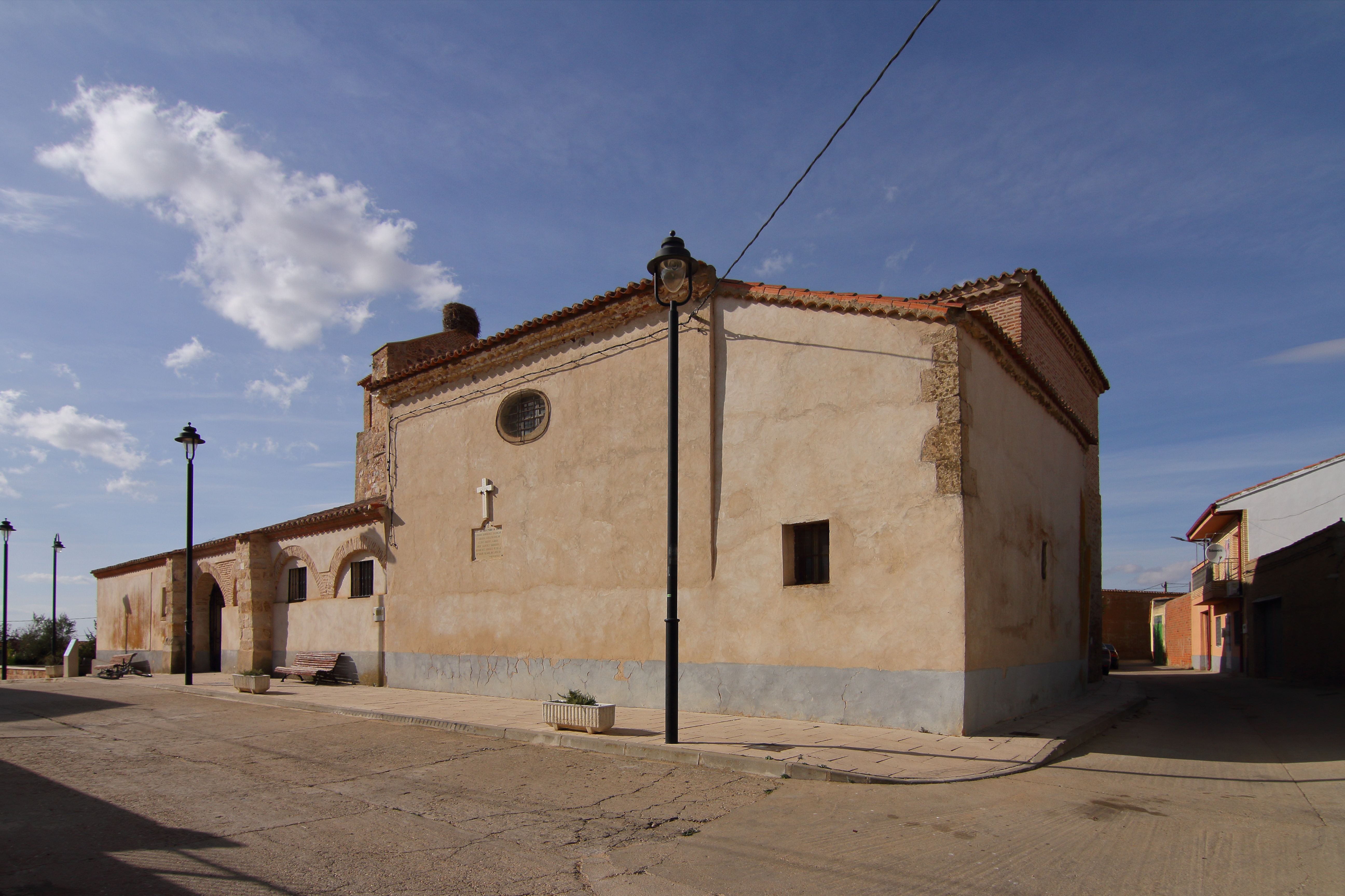 Pajares de la Lampreana, Iglesia de San Pedro, fachada sur y este